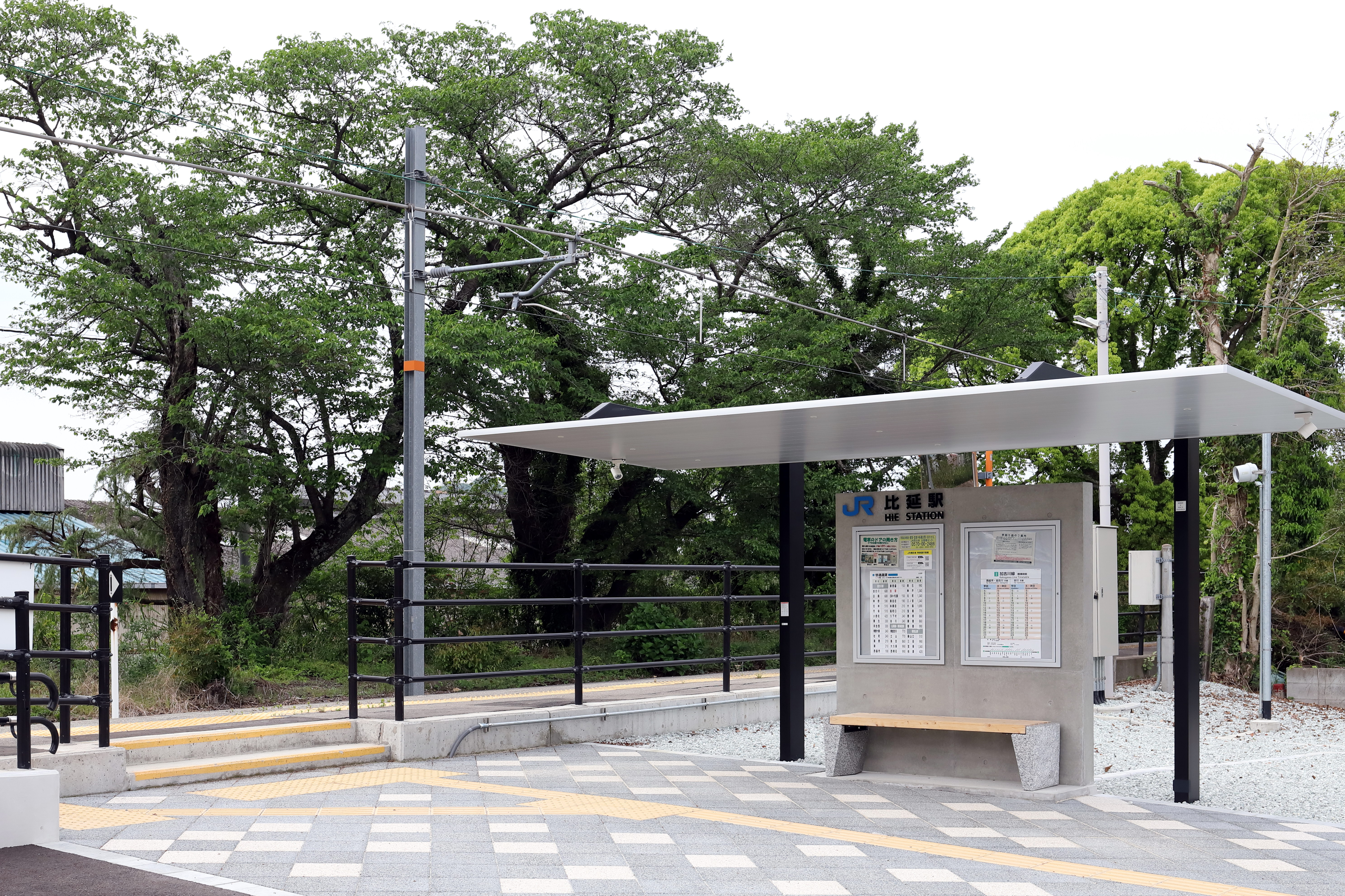 比延駅 駅舎解体整備後の風景